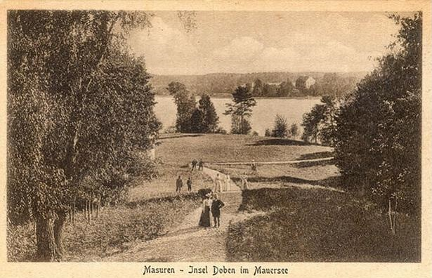 Postkarte mit der Insel Doben im Mauersee, Masuren